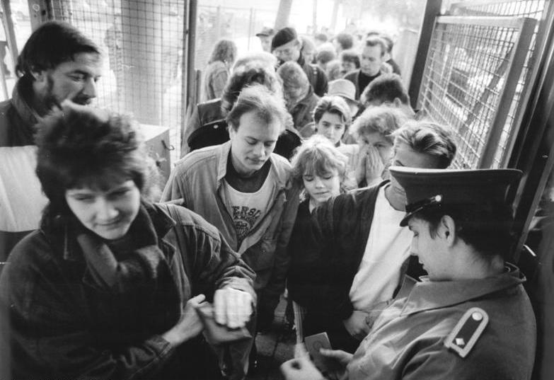 ADN-ZB-Mittelstädt-10.11.89-Berlin: Grenze-Am Grenzübergang Chausseestraße riß der Strom von DDR-Bürgern, die nach Inkrafttreten der neuen Reiseregelungen eine Tagesreise nach Berlin (West) unternehmen wollen, nicht ab. Die Abfertigung durch die Angehörigen der Grenztruppen der DDR und des Zolls erfolgte freundlich, reibungslos und unkompliziert.